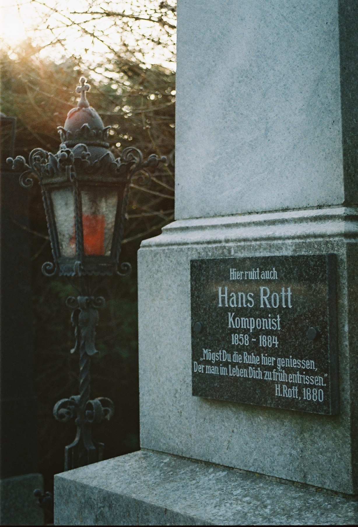 Gedenktafel für Hans Rott; Zentralfriedhof in Wien Grabstelle Gruppe 23 Reihe 2 Nr. 59; aufgenommen im Dezember 2010